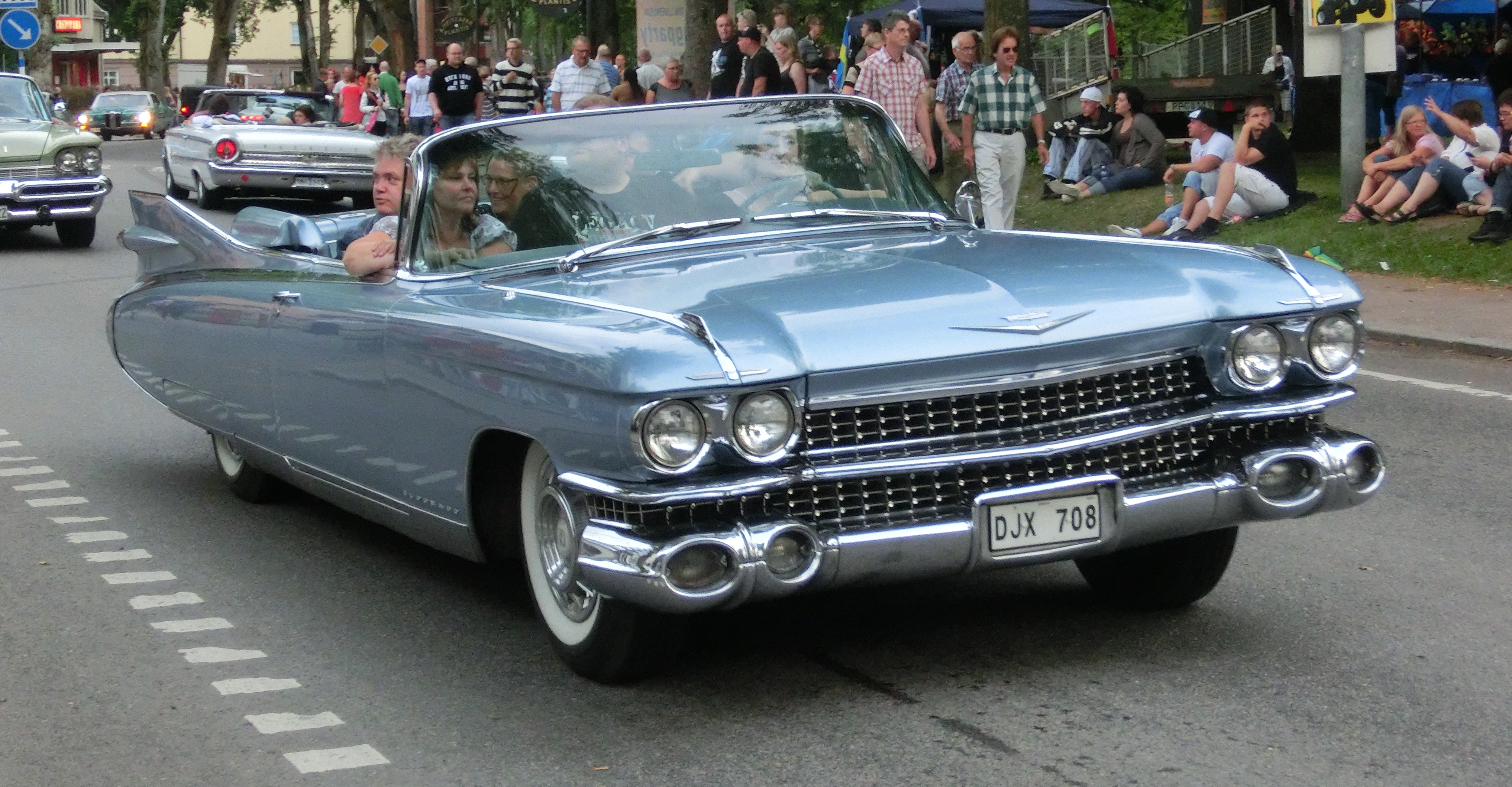 En blå Cadillac Eldorado 1959 på cruising på Ströget (Sankt Olofsgatan) i Falköping 2013-07-27.